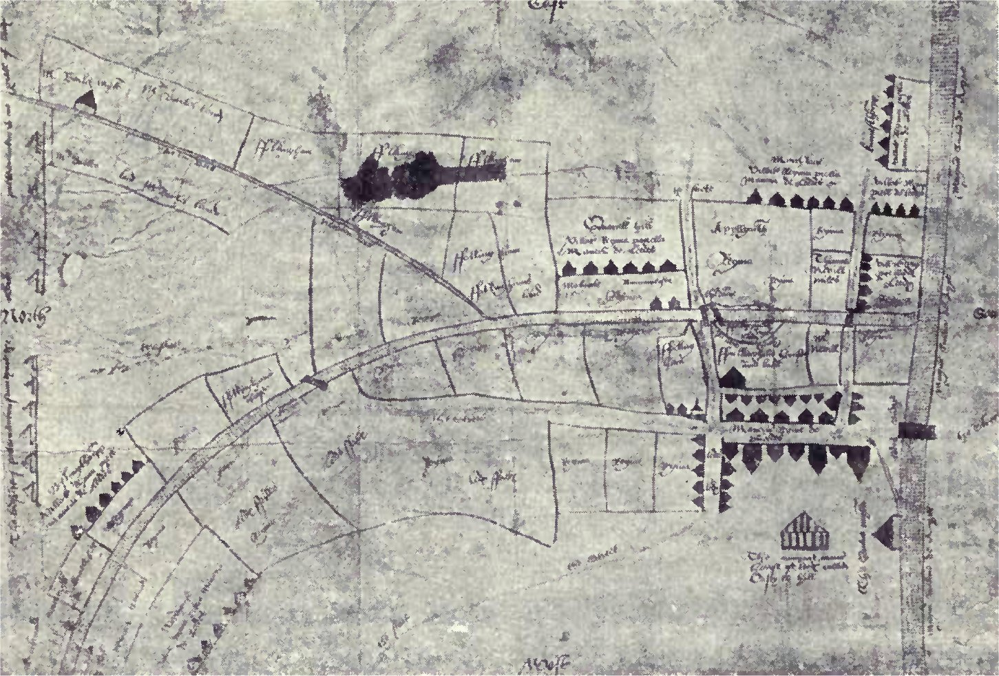 Leeds map - 1560